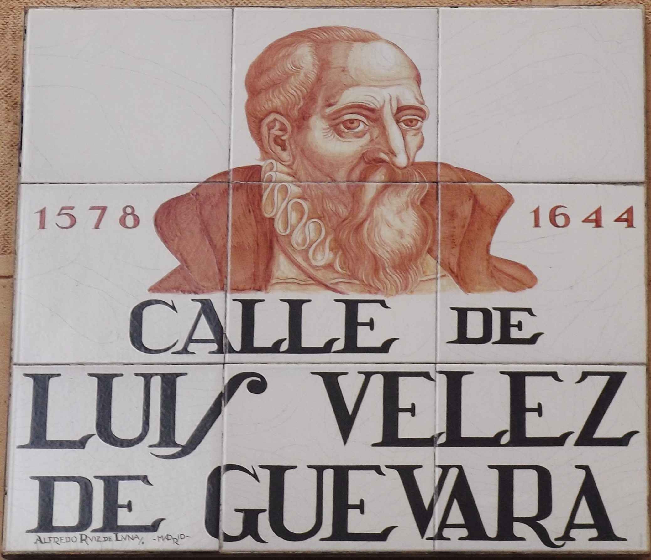 Placa de la calle de Luis Vélez de Guevara, Madrid, de Alfredo Ruiz de Luna